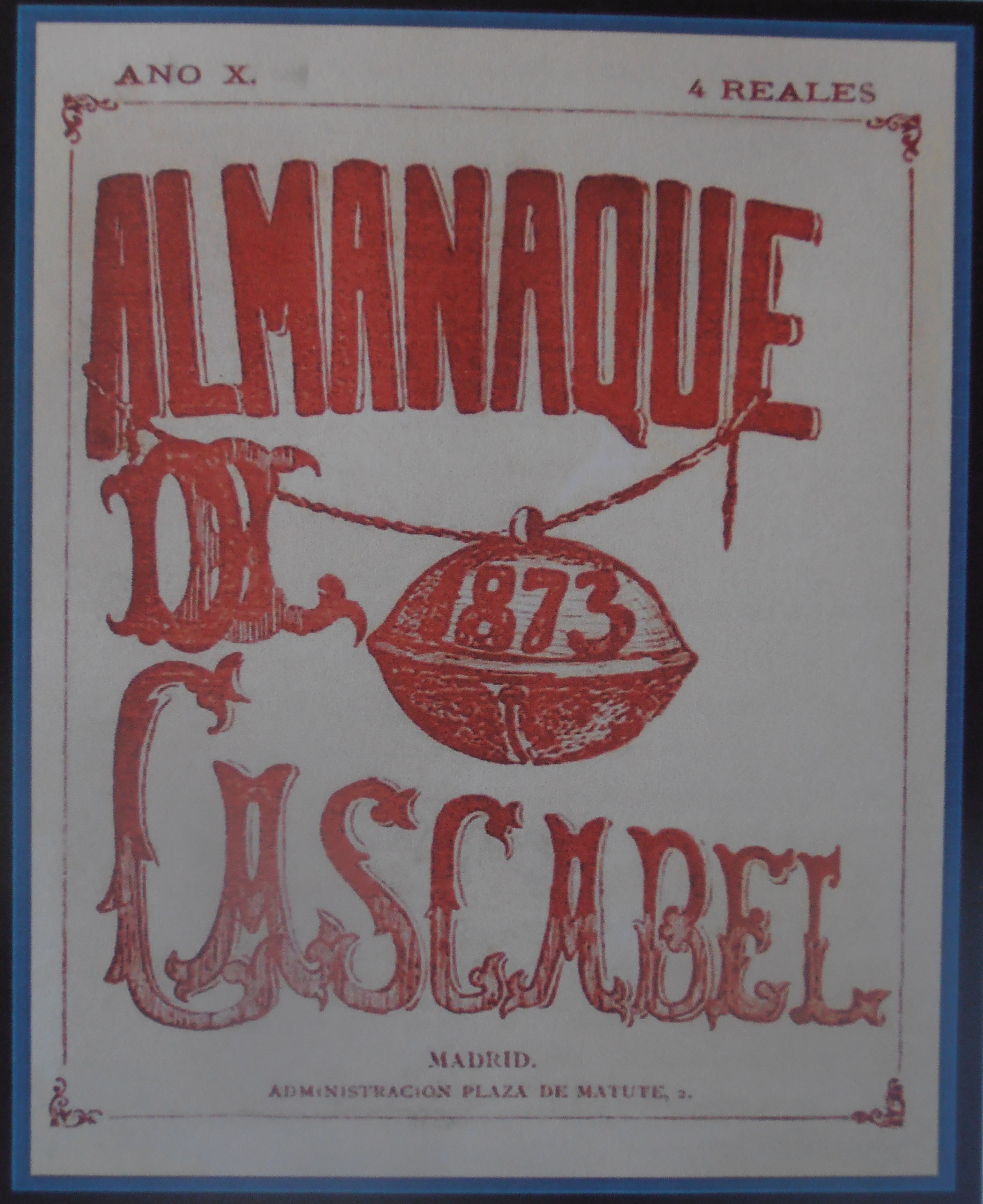 Portada de la revista sàtirica El Cacabel de 1873